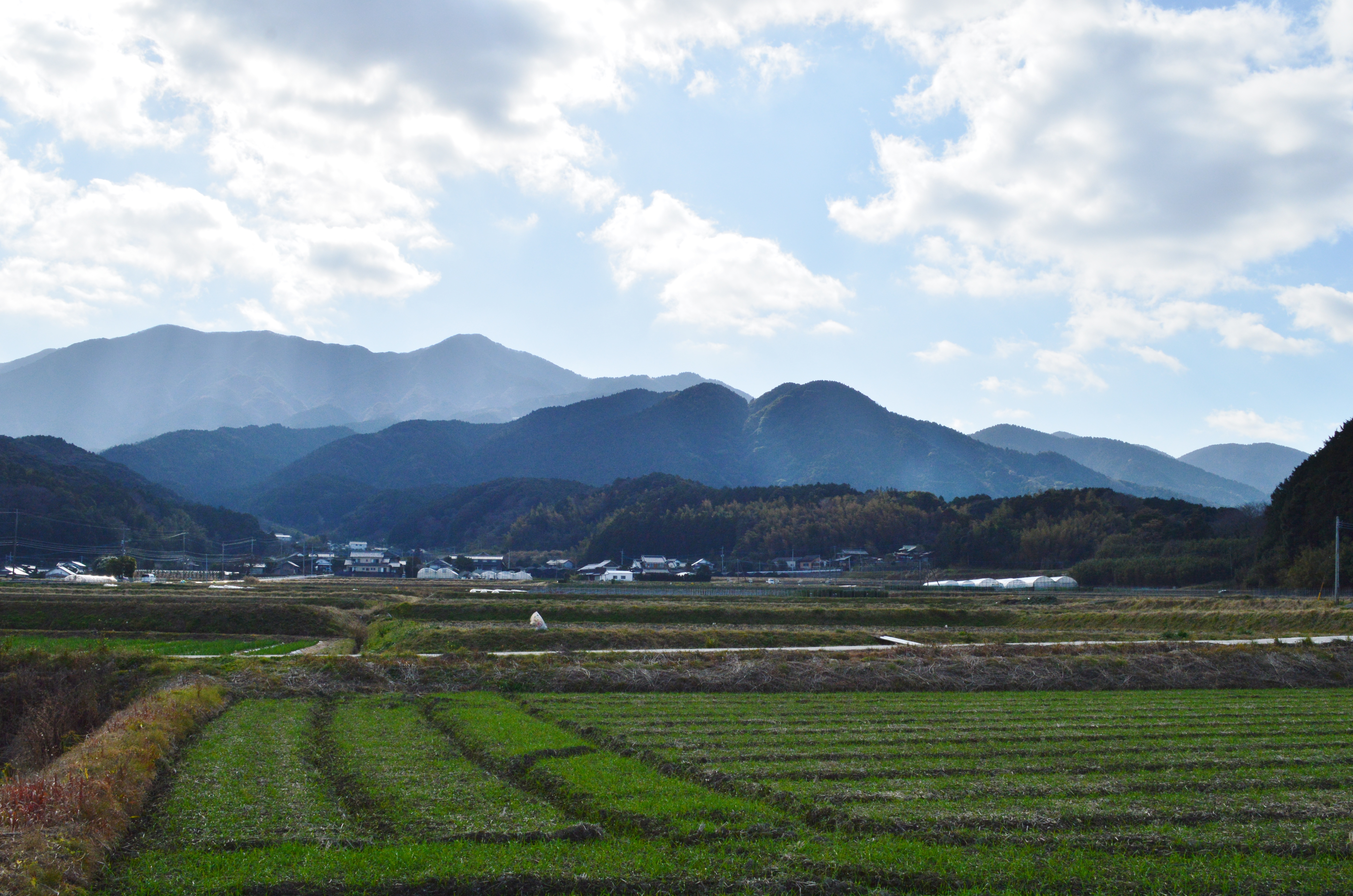 雷山 遠景